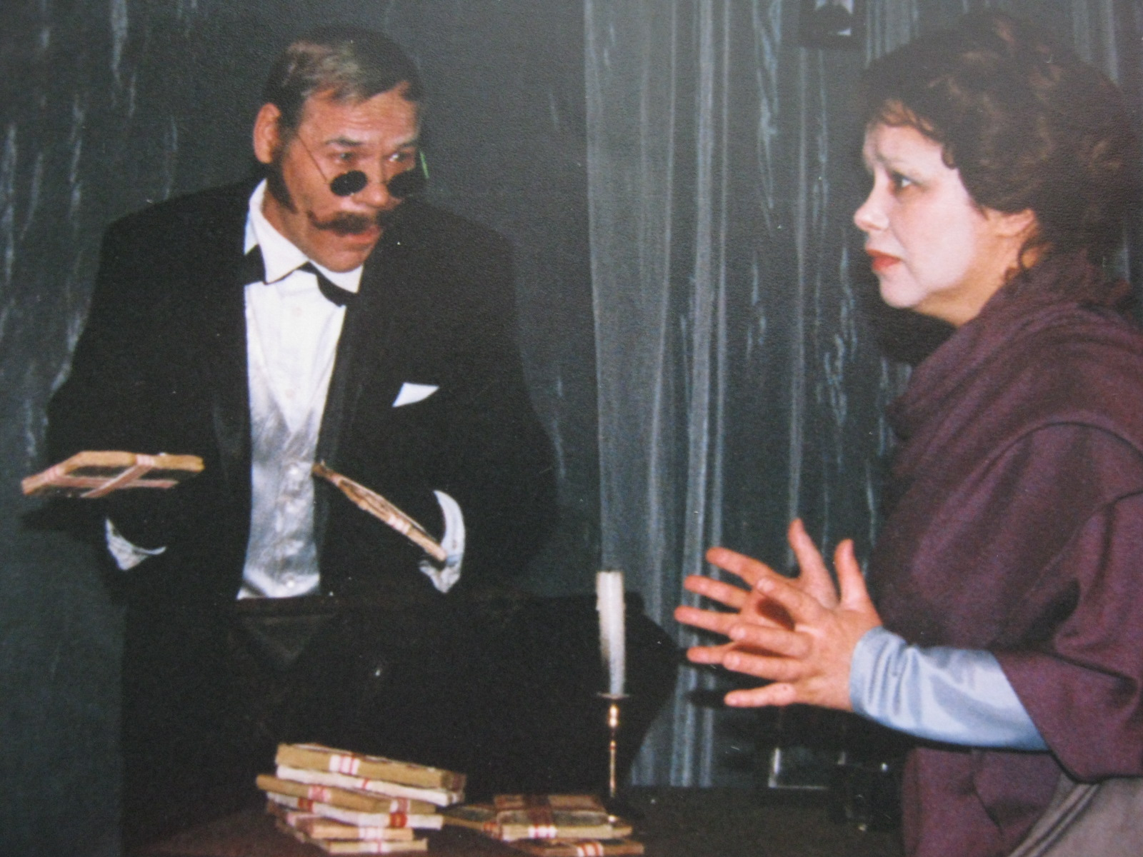 Сцена из спектакля «Дар Божий» Санкт-Петербургского драматического театра «Патриот» РОСТО. В роли Пауковского Юрий Оськин, в роли Марии Татьяна Кудрявцева.